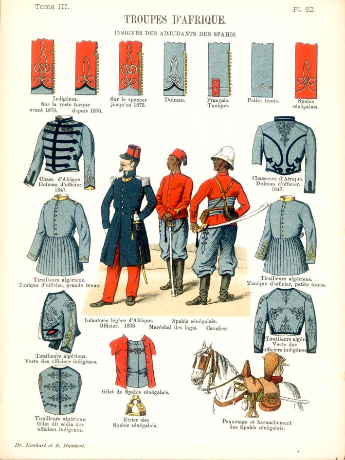 Planche 62 du tome III des « Uniformes de l'armée française », par le docteur Constant Lienhart et le professeur René Humbert. Adjudants des spahis, 1833.